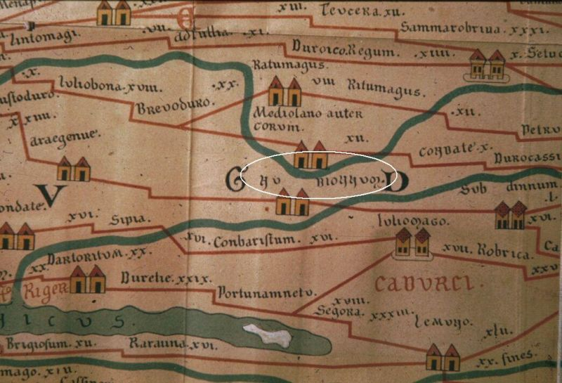 Fragment de la table de Peutinger mettant en évidence la situation de la cité de Jublains